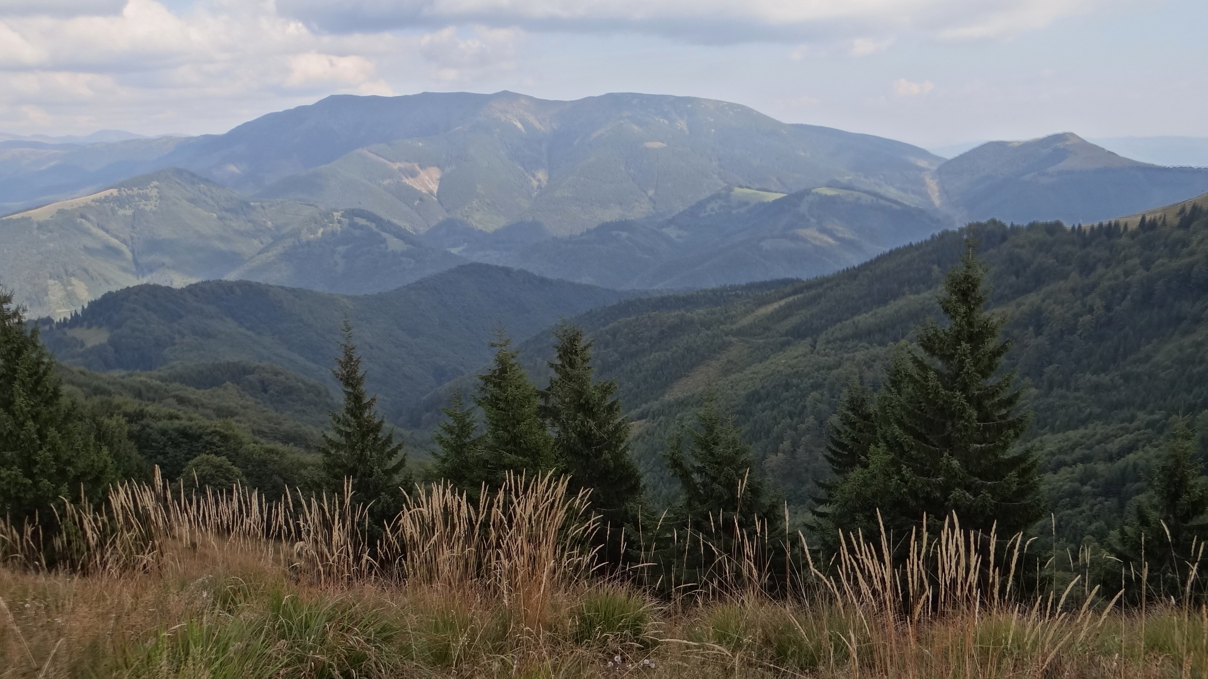 View from Velka Fatra (Zvolen - Malý Zvolen)